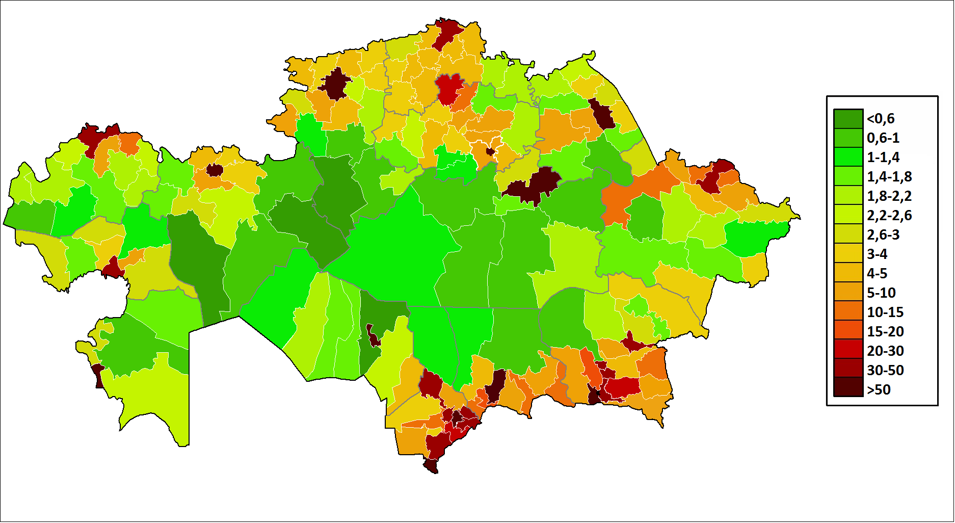 Плотность населения Казахстана. Города, находящиеся между районов умышлена присоединялись к одному из них на усмотрение автора. Байконур не учитывался.